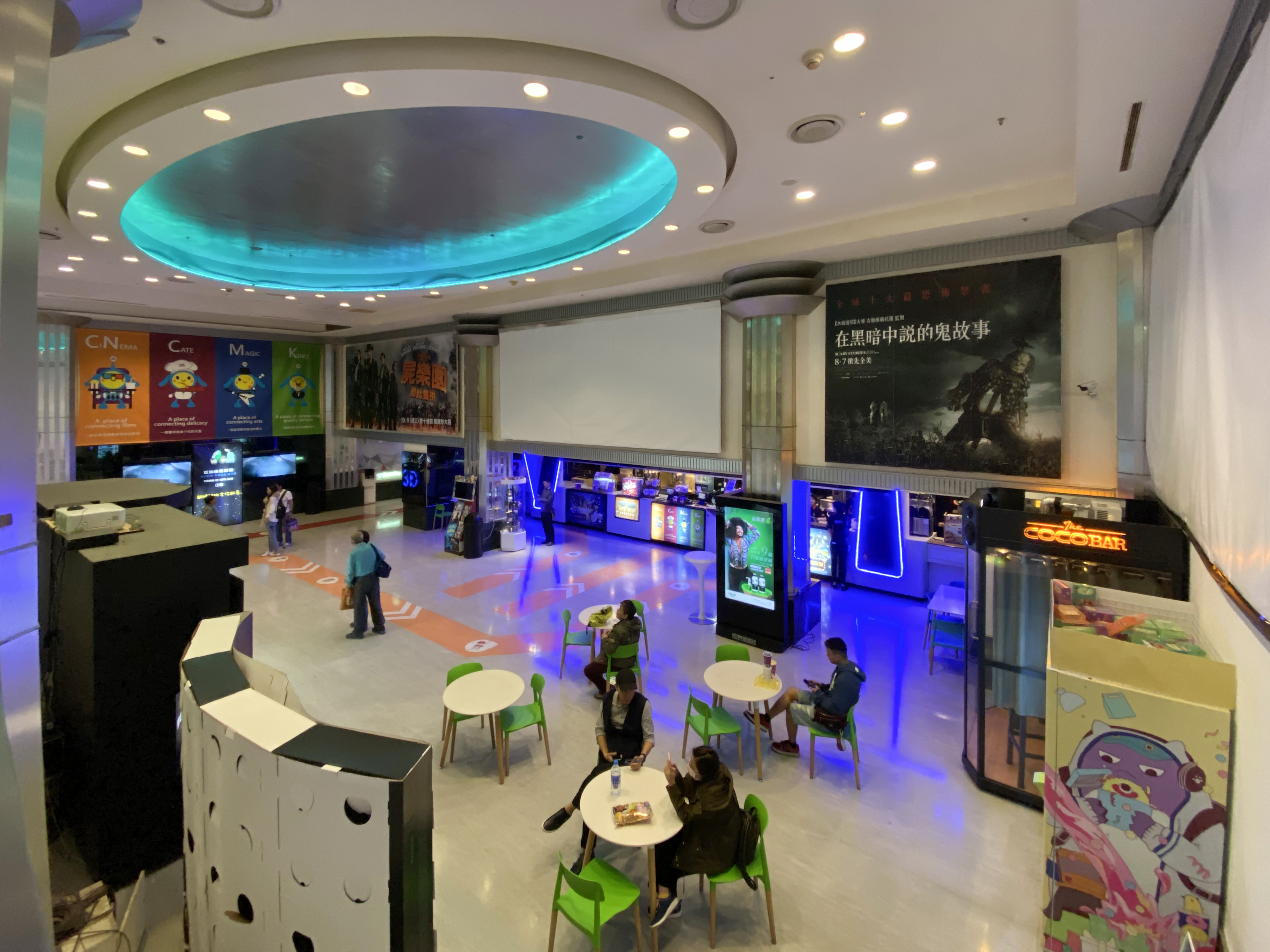 喜滿客影城 京華城影城